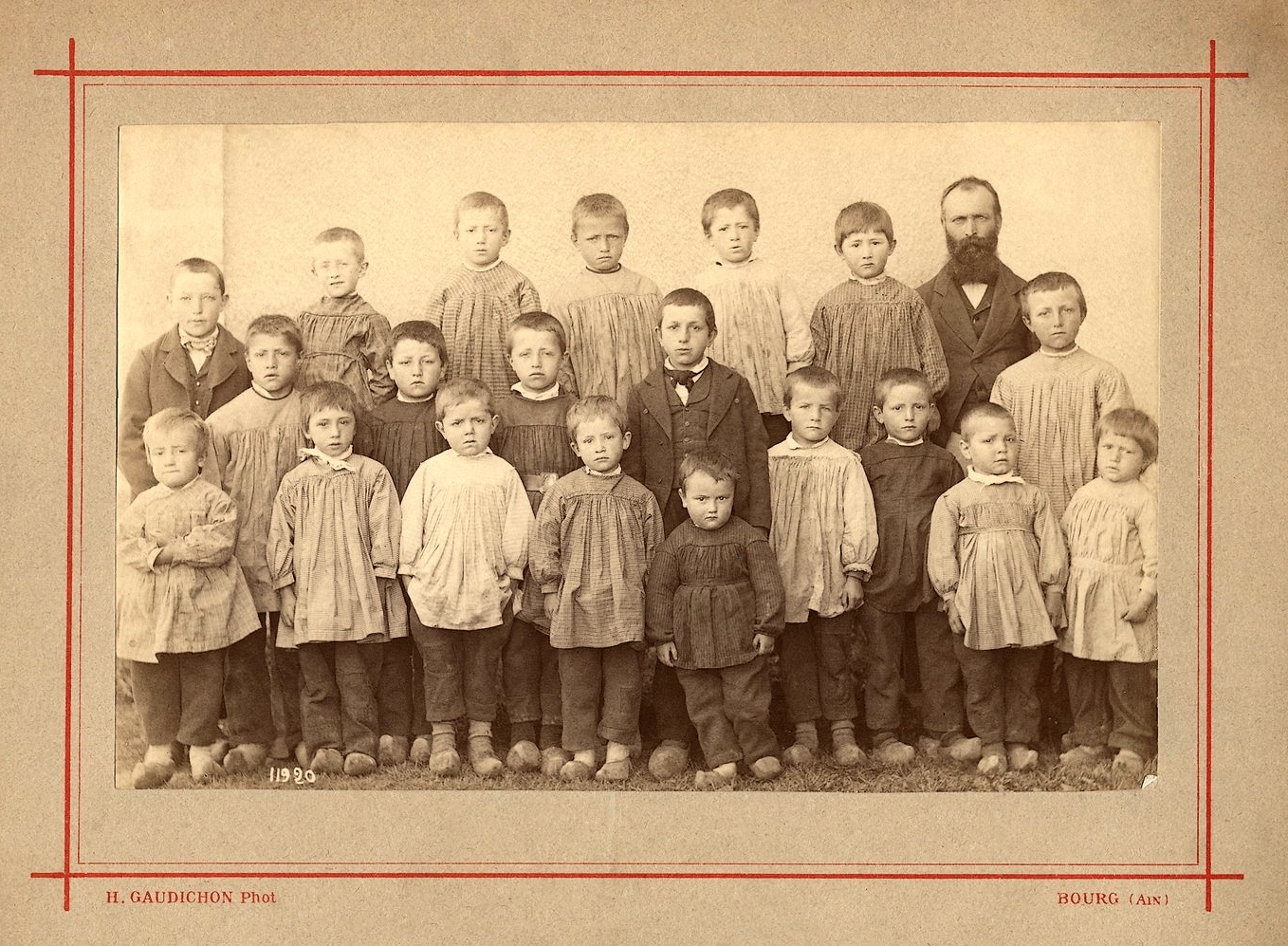 Chastel-Nouvel (Lozère) classe de garçons de l'école communale vers 1880. Photographe Henri Gaudichon (1848-?) Bourg-en-Bresse. Archives du musée national de l'éducation, Rouen. Inv. 1979.36669.84 001e.